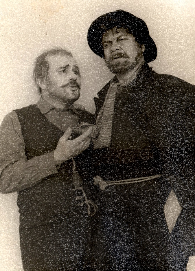 Отмеченный критиками и горьковедами спектакль Магнитогорского драматического театра им. А. С, Пушкина "На дне" по одноименной пьесе Максима Горького, сезон 1967-1968 гг. Слева направо: Л. Г. Самарджиди - Барон, Н. Ф. Галактионов - Сатин